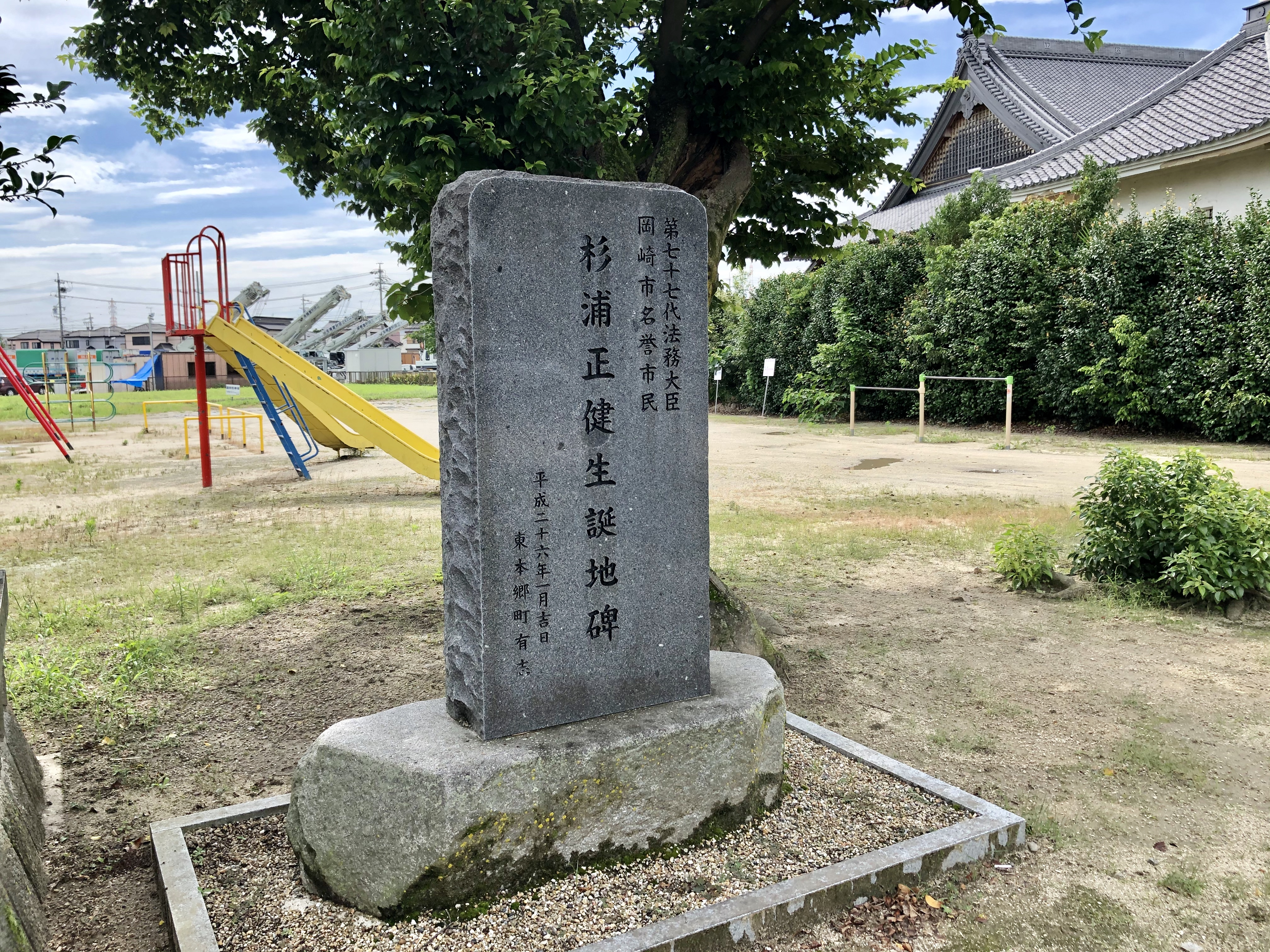 飛鳥神社の敷地と正法寺（岡崎市東本郷町）